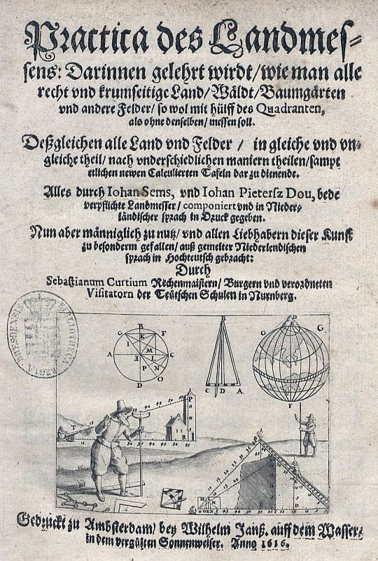 Original image description from the Deutsche Fotothek Geometrie & Vermessung & Instrument